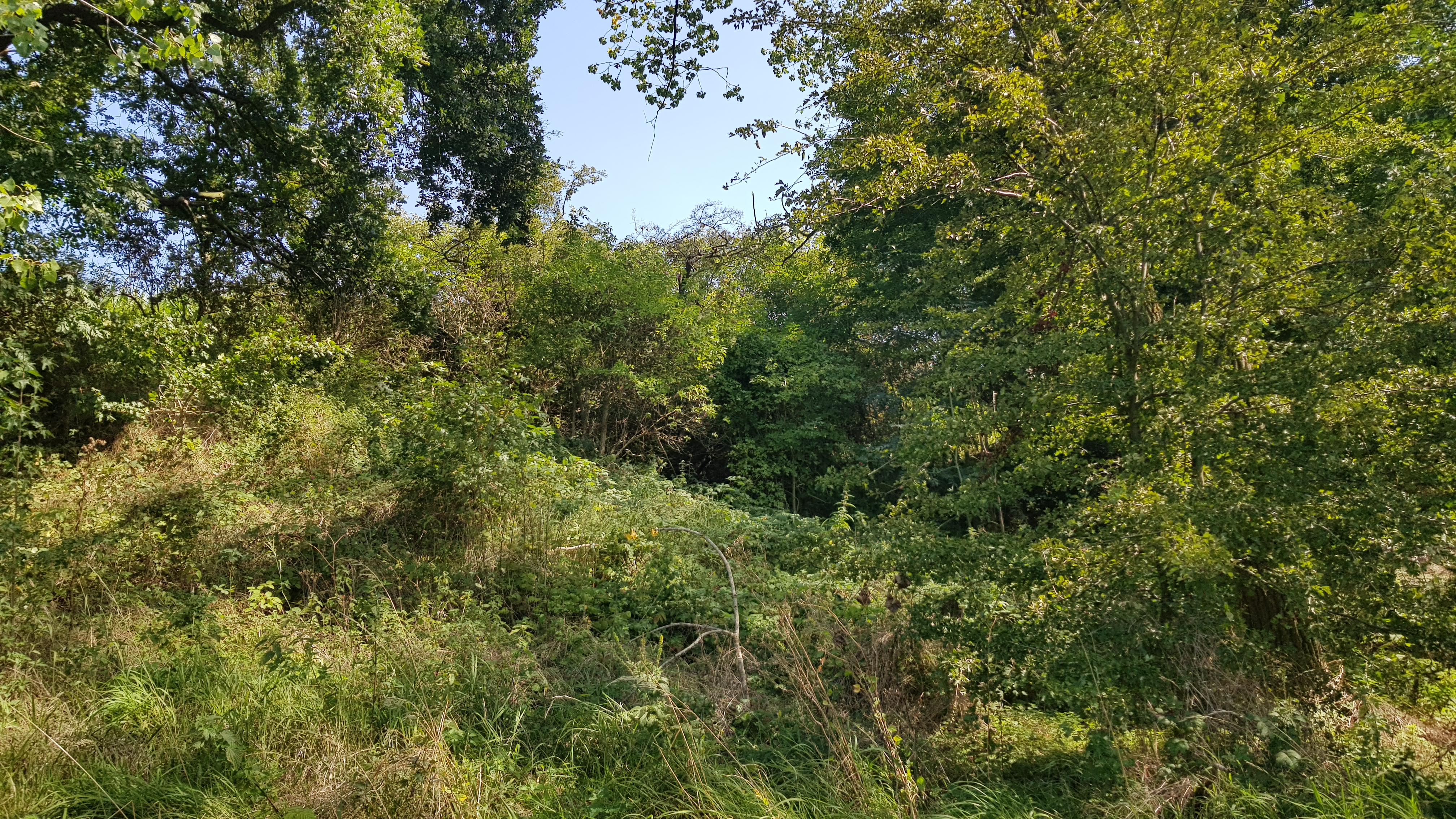 Groeve in de Grindkuil (Biebosch), Valkenburg, Nederland